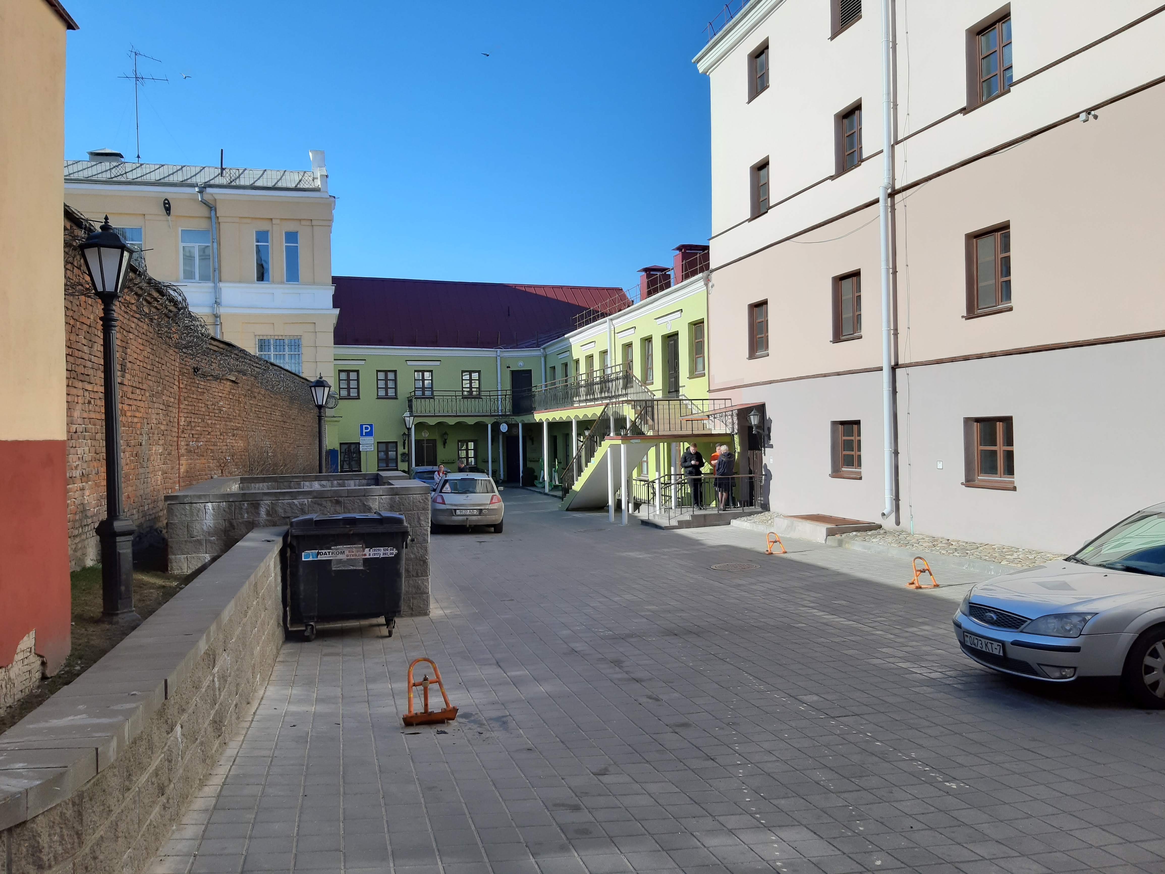 Мінск. Інтэрнацыянальная ў сакавіку 2019